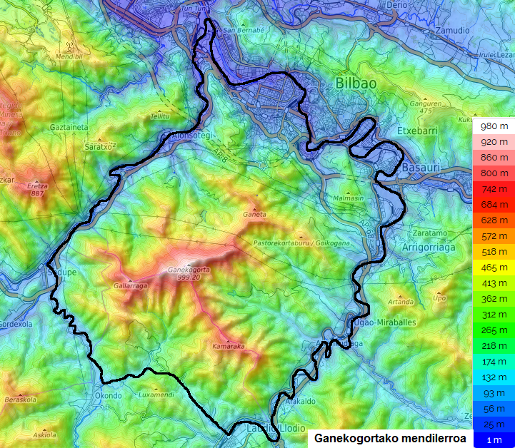 Ganekogortako mendilerroaren mapa topografikoa.